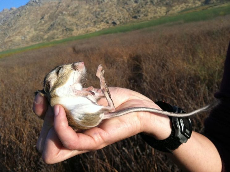 Mammals: Desert Kangaroo Rat